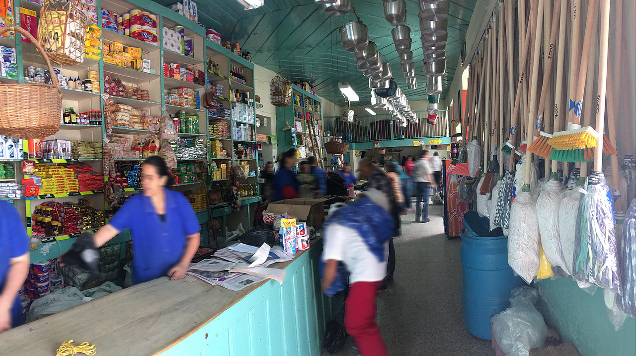 Tienda de abarrotes a un costado de la Plaza de Ruíz y Zapata en Sonsón.